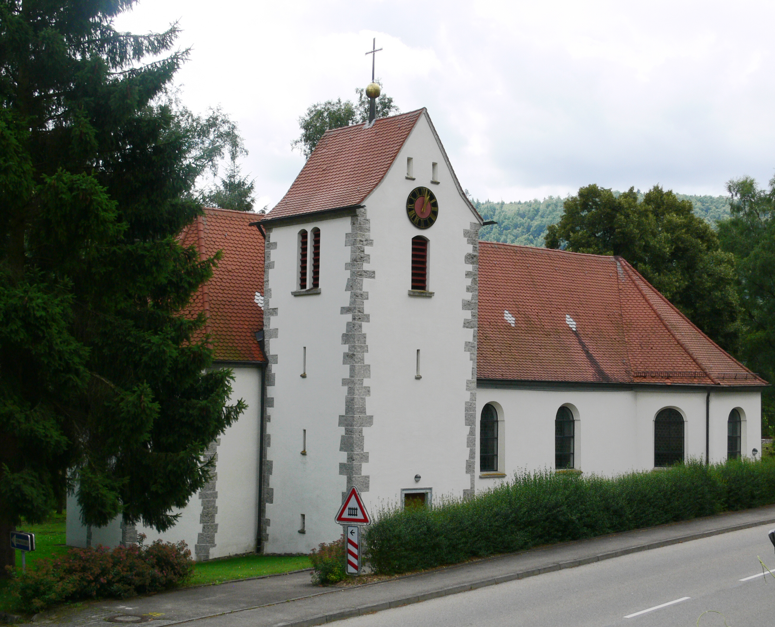 Pfarrkirche St. Nikolaus, Hausen im Tal, Gemeinde Beuron, Landkreis Sigmaringen